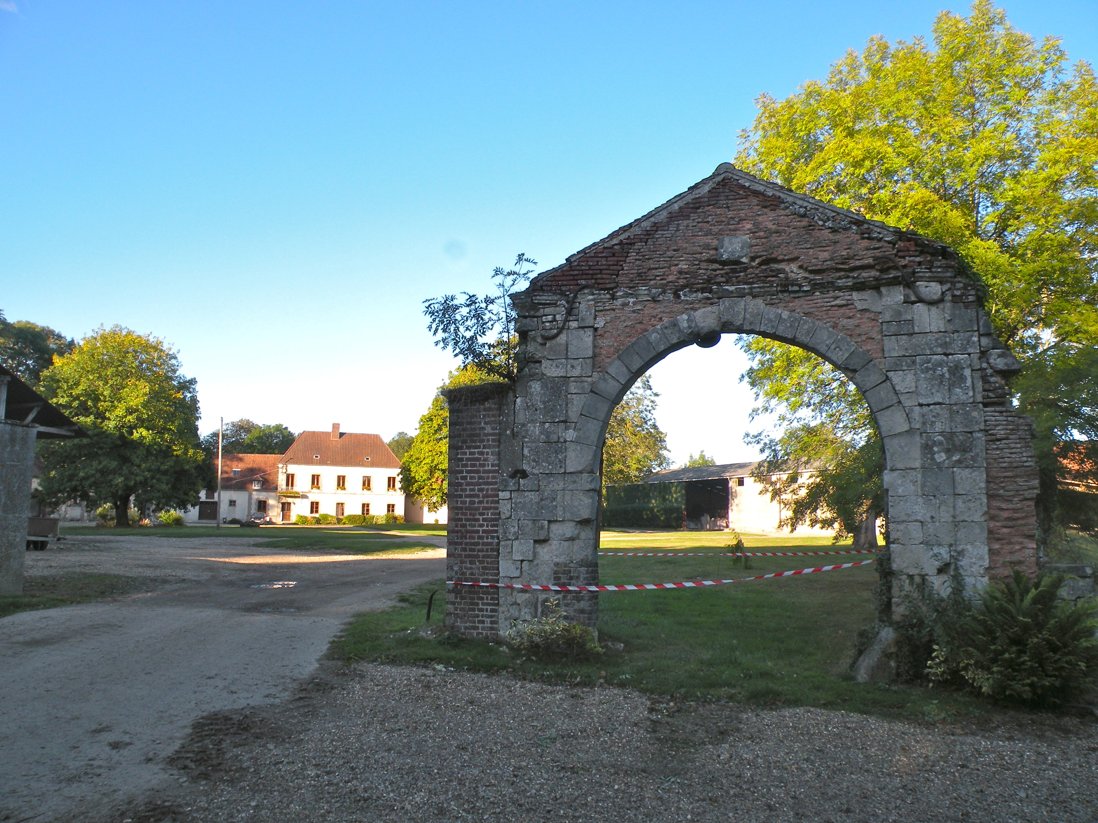 portail de l'abbaye Saint-Nicolas de Marcheroux